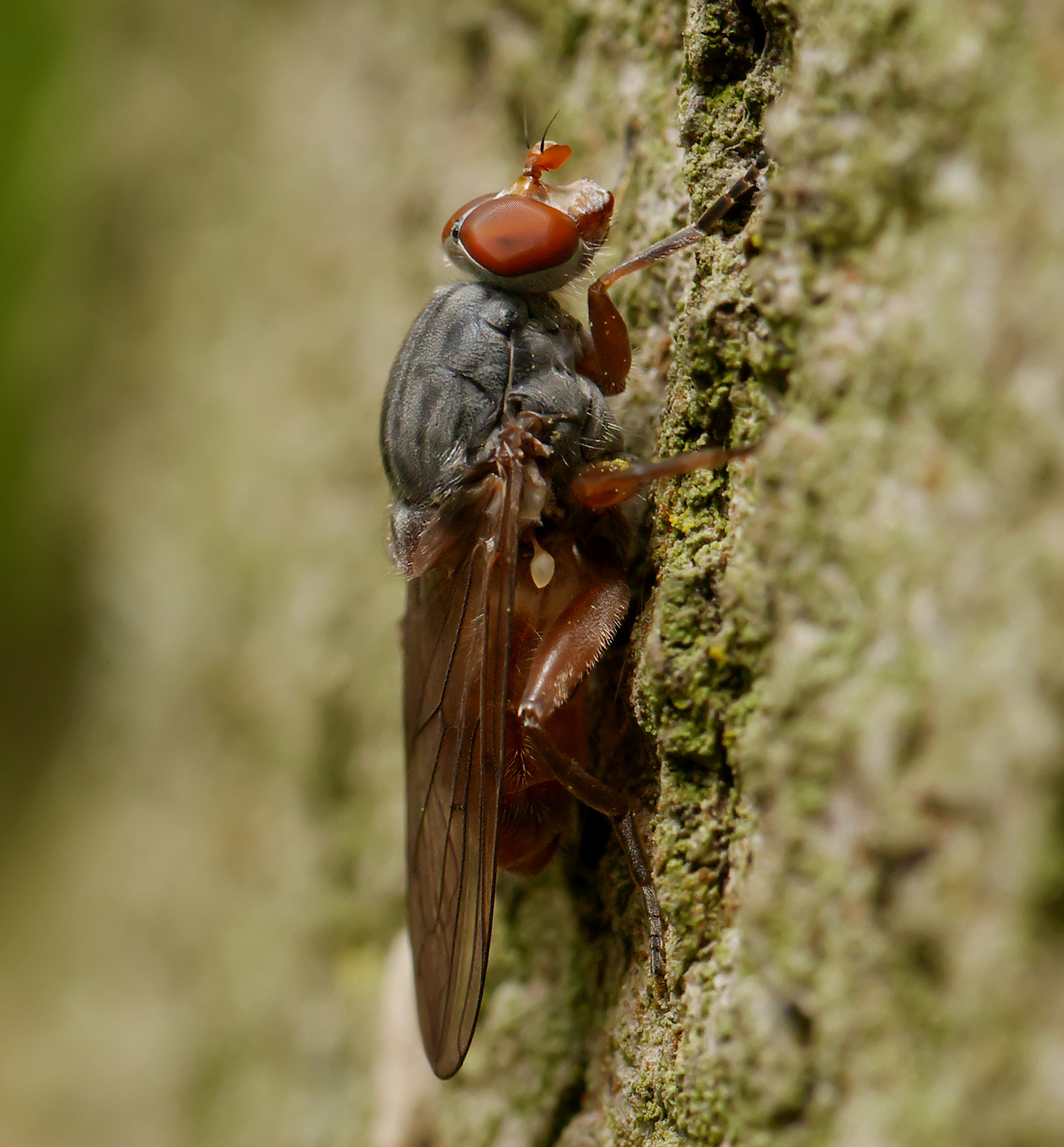 Panasonic GX7 + Leica DG Macro-Elmarit 45mm F2.8 ASPH OIS